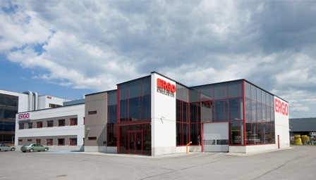 ERGO kahjukäsitluse maja A.H Tammsaare tee 118c